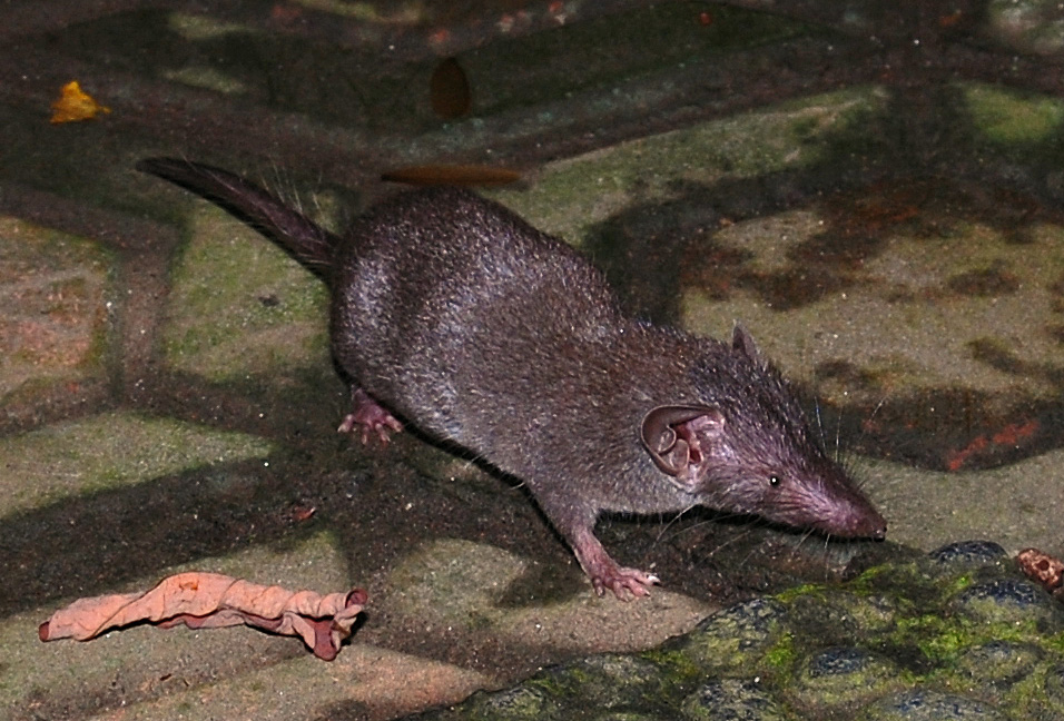 Suncus murinus. Darmaga, Bogor, West Java, Indonesia